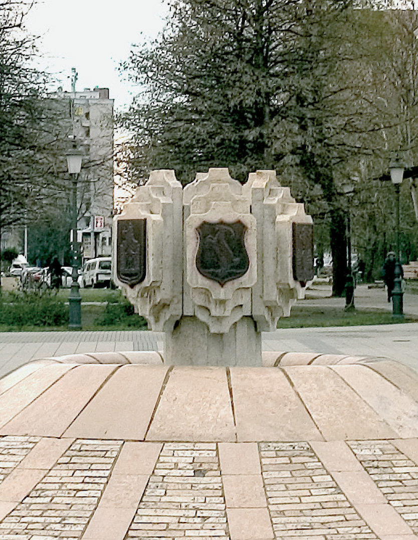 Címerdomb a kecskeméti Kossuth téren (Pálfy Gusztáv szobrász és Farkas Gábor építész alkotása, 1984)